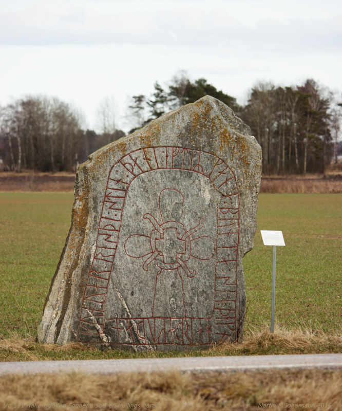 Vg 152 Håkansgåden Eggvena socken Kullings härad